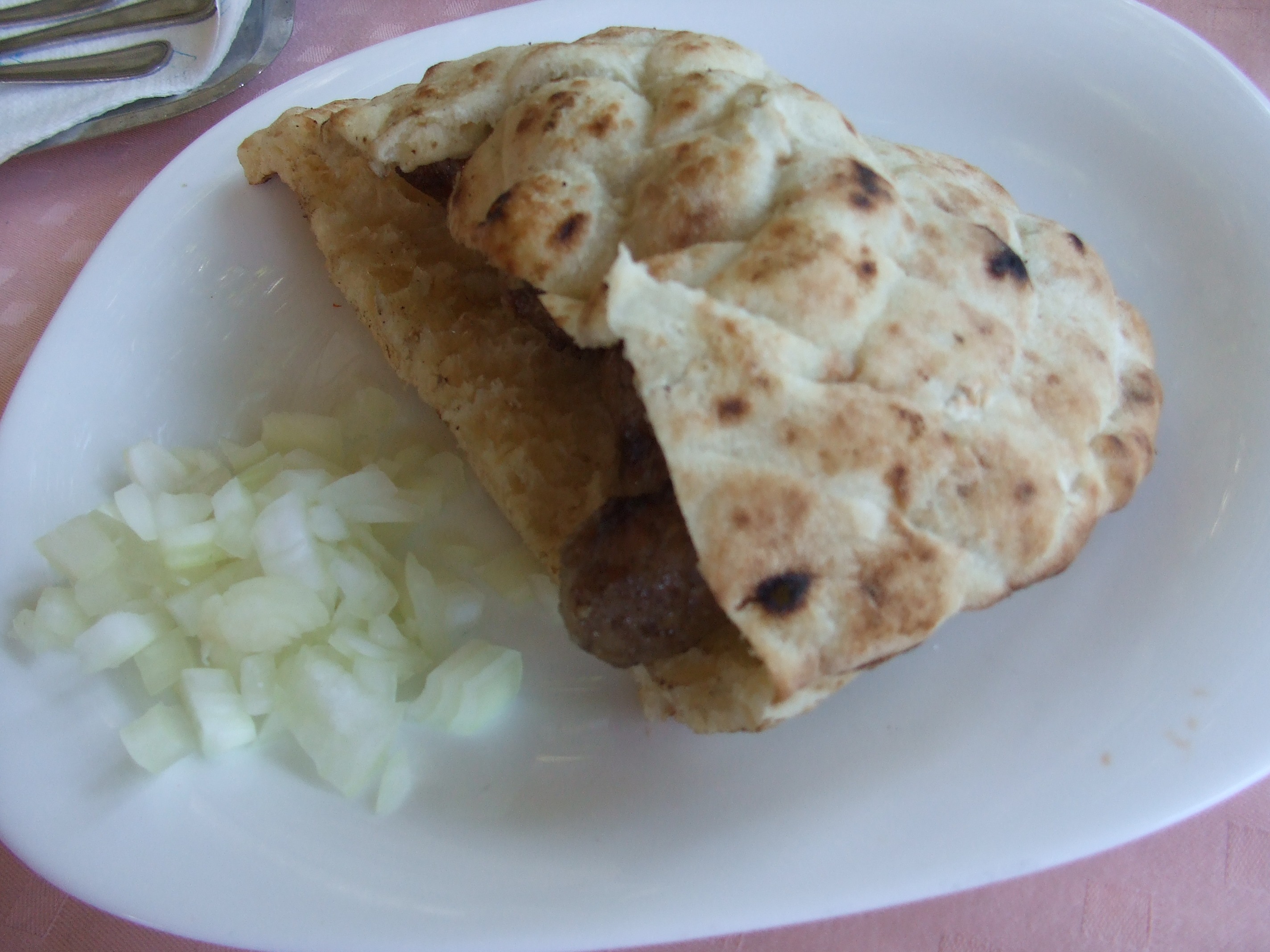 Cevapi - Urban Grill, Mostar Ćevapi - Mostar